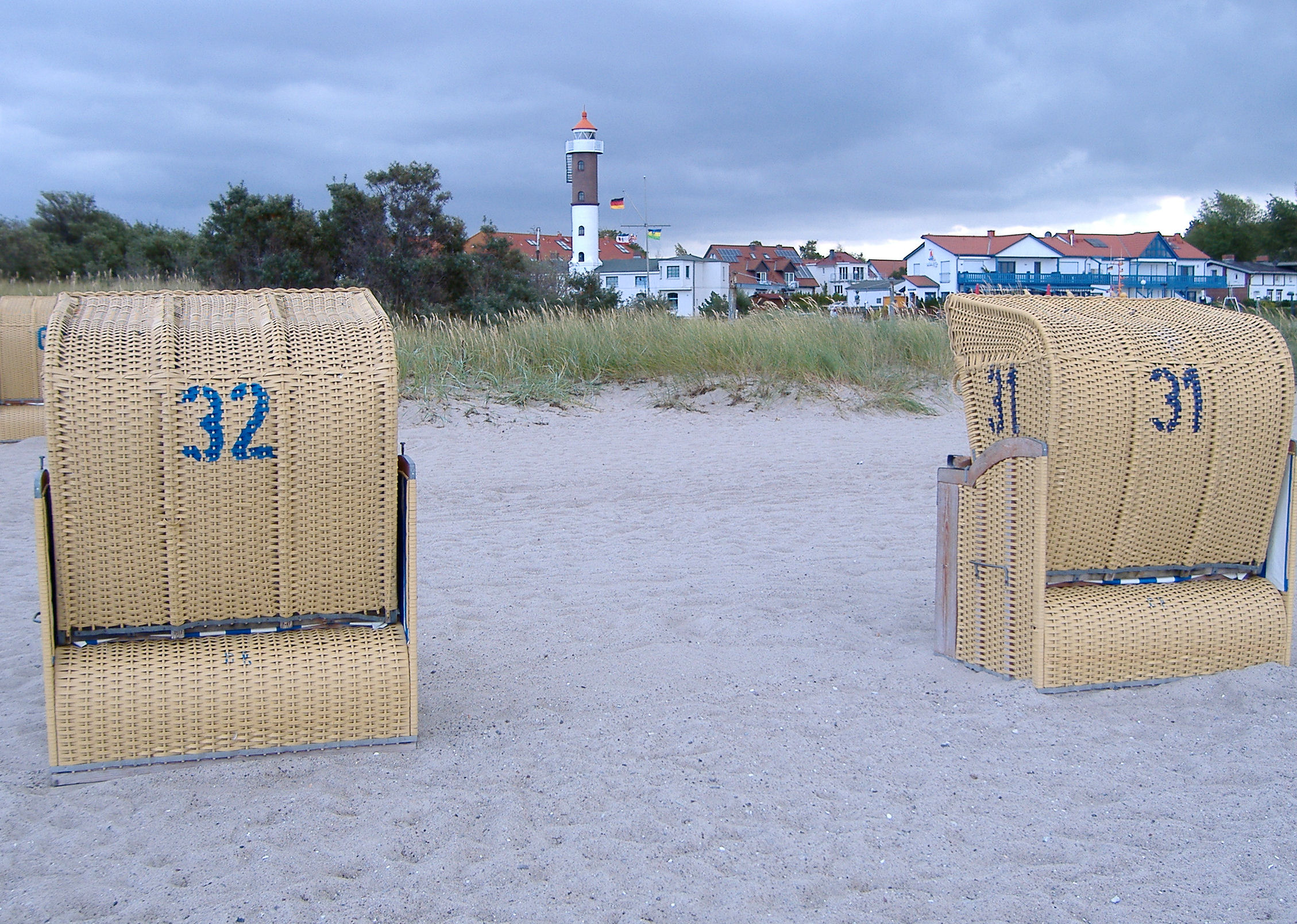 Blick zum Timmendorfer Leuchtturm vom Strand aus.